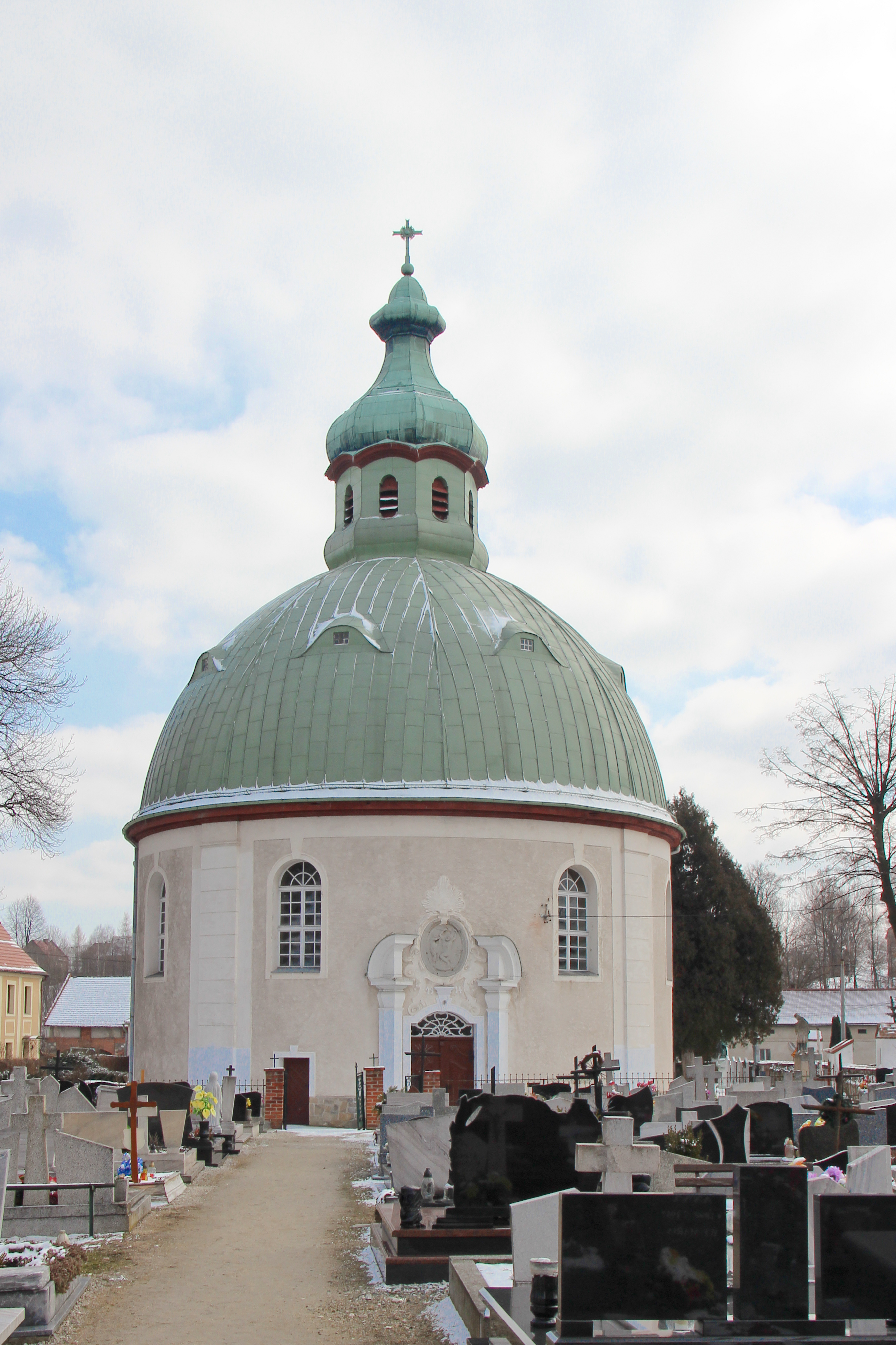 Burgrabice – rzymskokatolicki kościół parafialny p.w. św. Bartłomieja, poł. XVI, 1720, 1913/1914